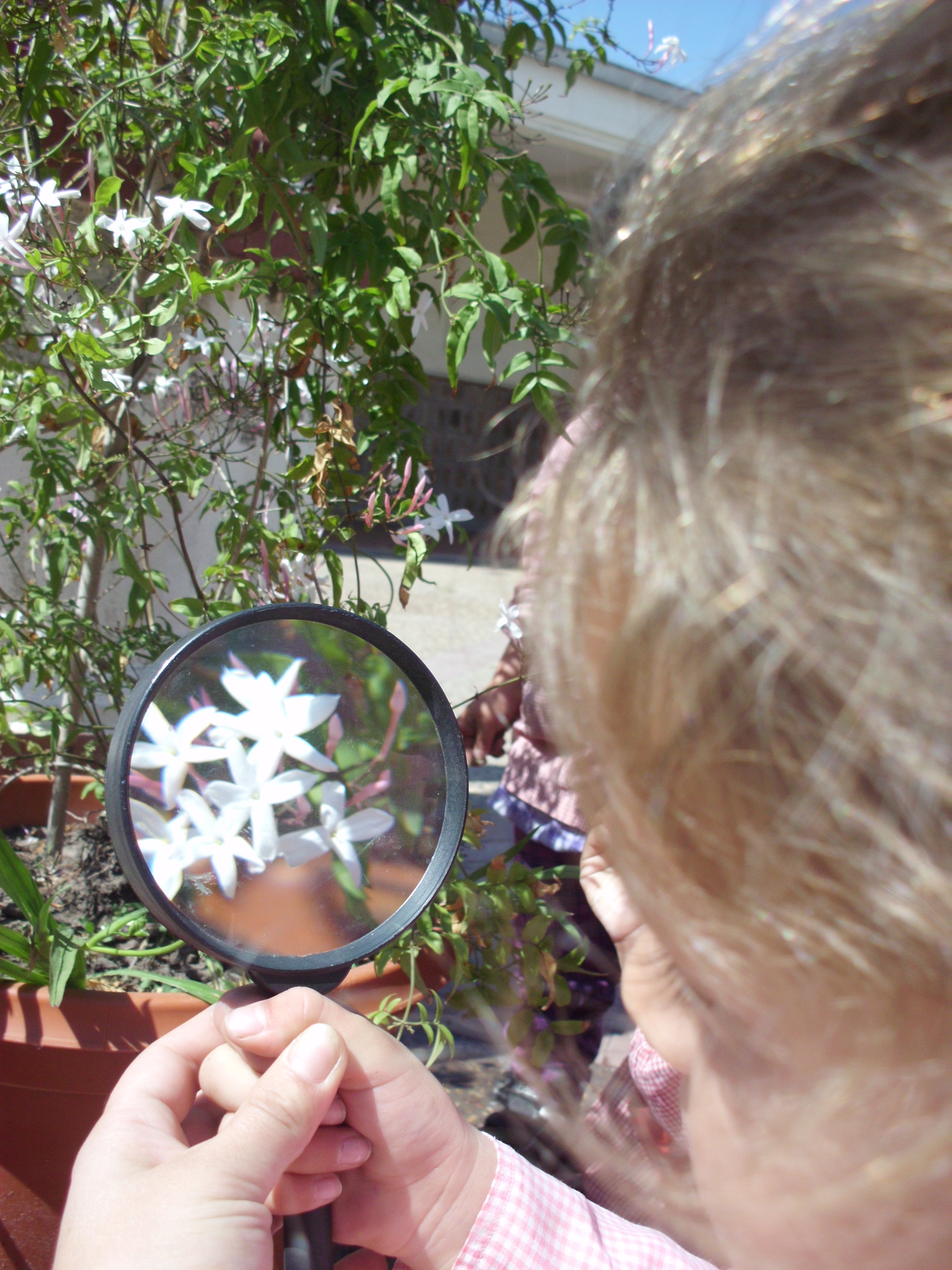 la naturaleza al alcance